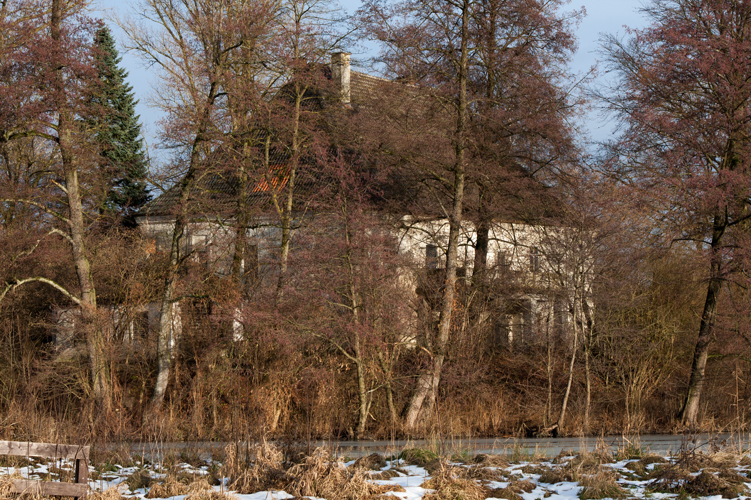 mit Walmdach, barock, 1952 überarbeitet. This is a photograph of an architectural monument.